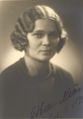 Aleksandra Raatma, eesti arstiteadlane